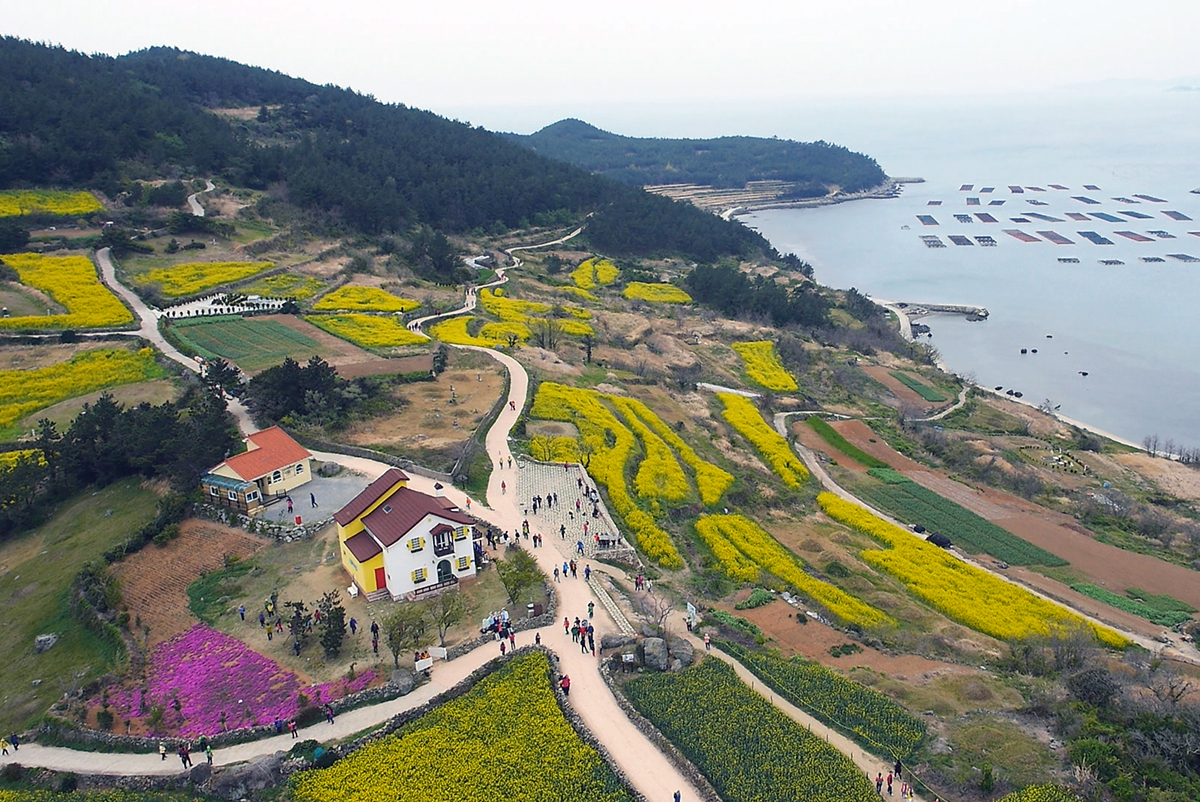 청산도 슬로길. 드라마 봄의 왈츠 및 여인의 향기 세트장 상공에서 찍은 항공사진